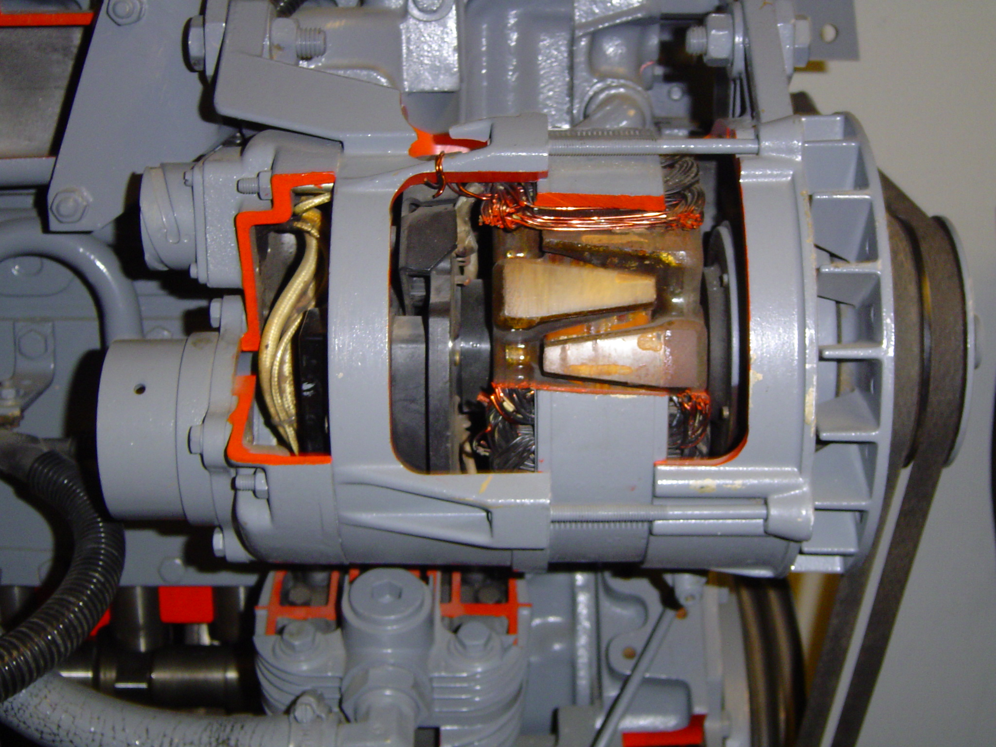 Drápkový alternátor běžně používaný v automobilech.